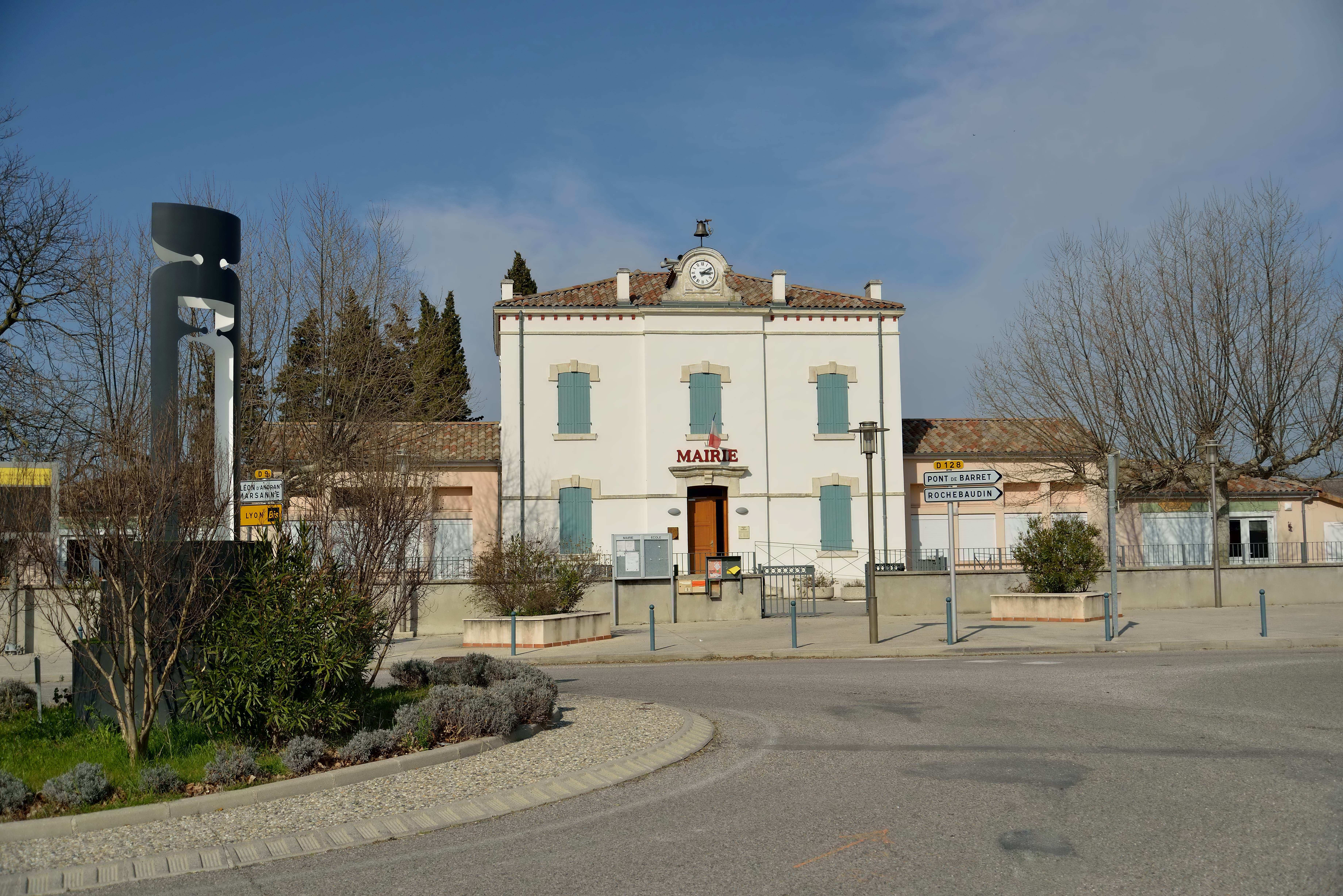 le mairie